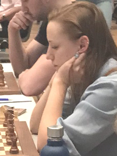 Yuliya Shvayger, Runde 9 der Grenke Chess Open 2019 in Karlsruhe.